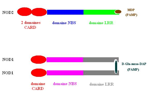 Structure des différents domaines fonctionnels des récepteurs NOD1 et NOD2, associés au motif bactérien qu'ils reconnaissent (fixation sur le domaine LRR).